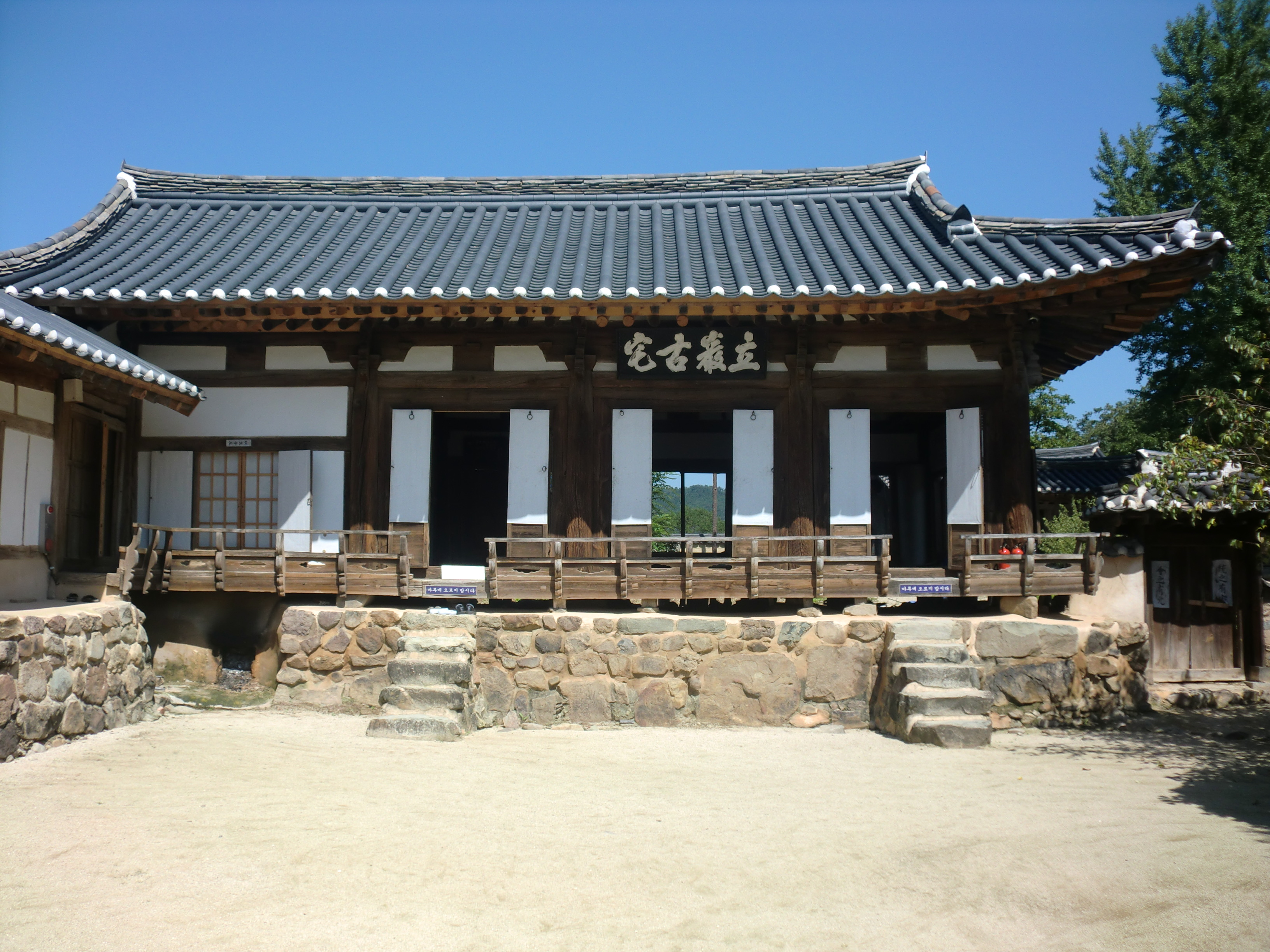 안동양진당(하회마을)